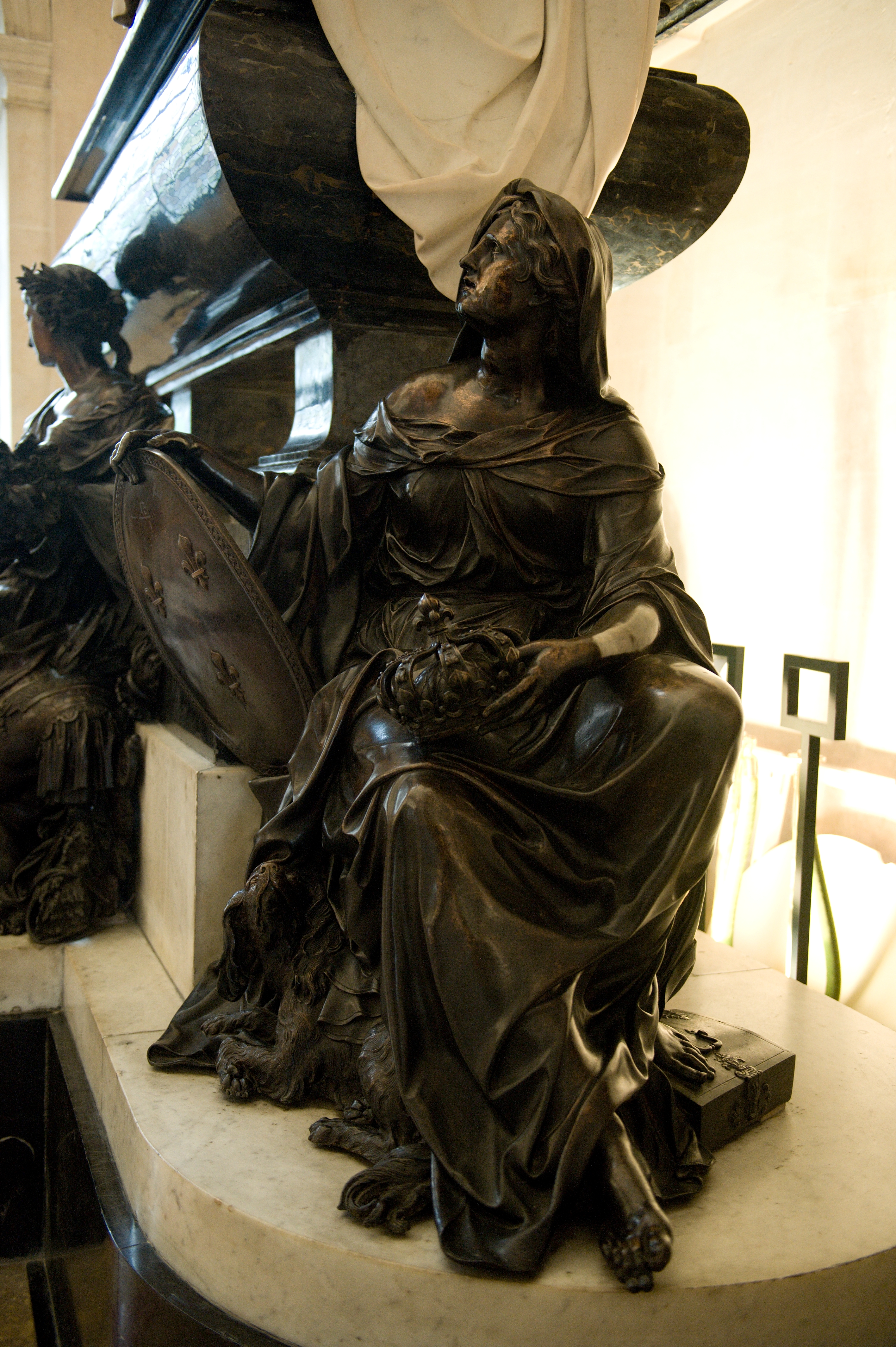 Figure en bronze de La Fidélité attribuée à Jean-Baptiste Tuby, tombeau de Mazarin par Antoine Coysevox, chapelle de l'Institut de France - Paris